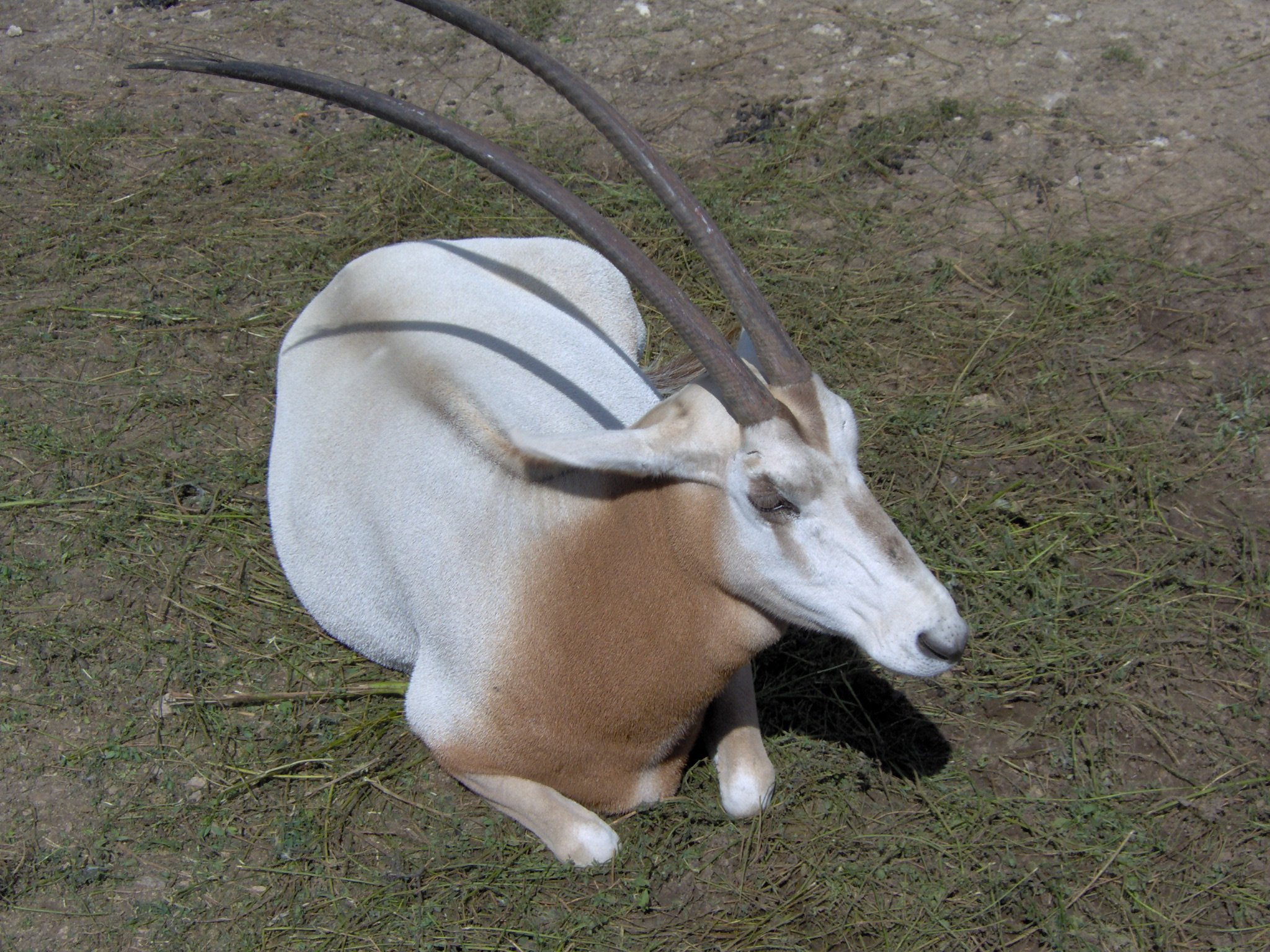 Kardszarvú antilop pihen a napon, Veszprémben. User:Mathae sk.